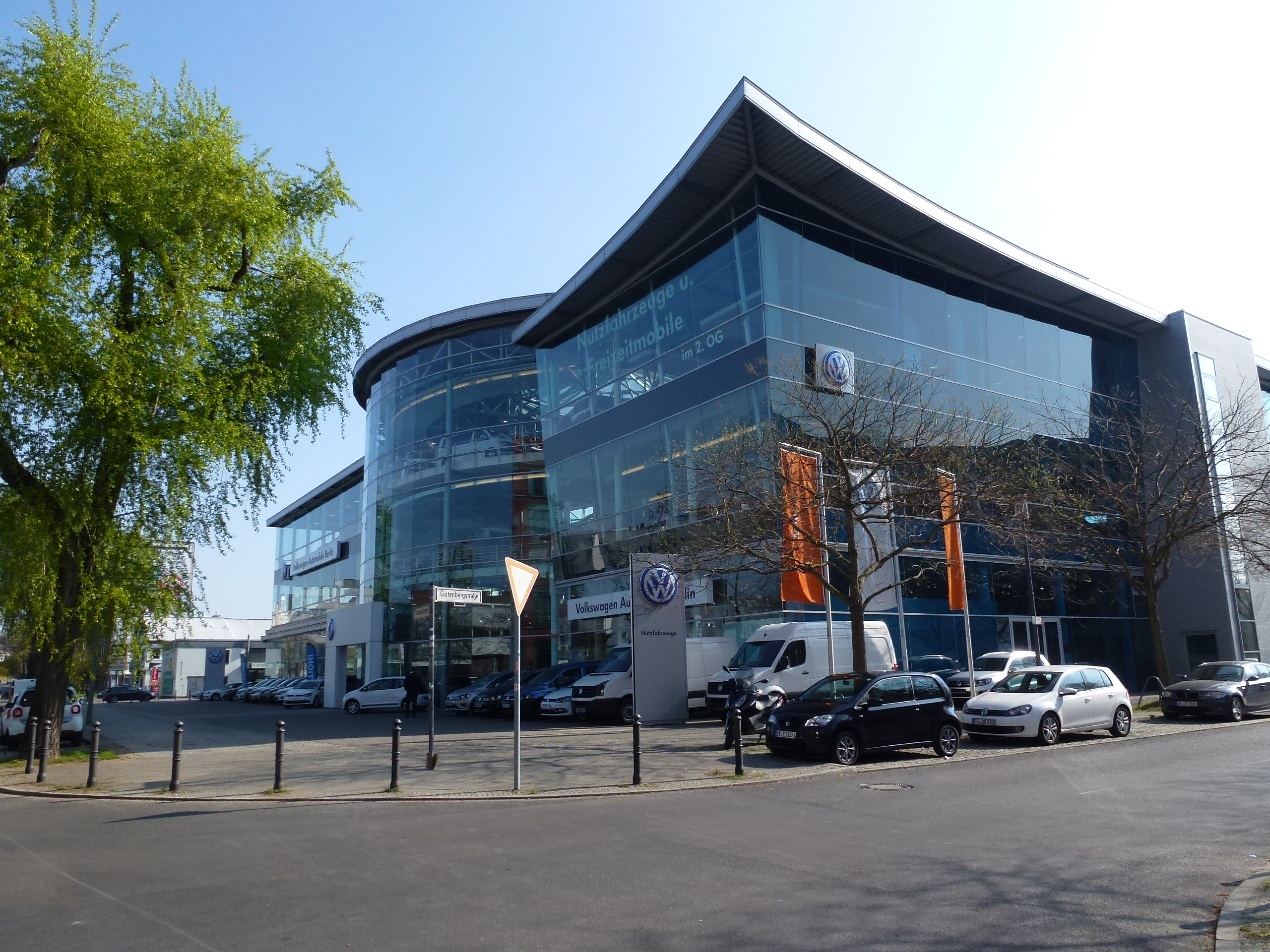 Berlin-Charlottenburg Franklinstraße VW